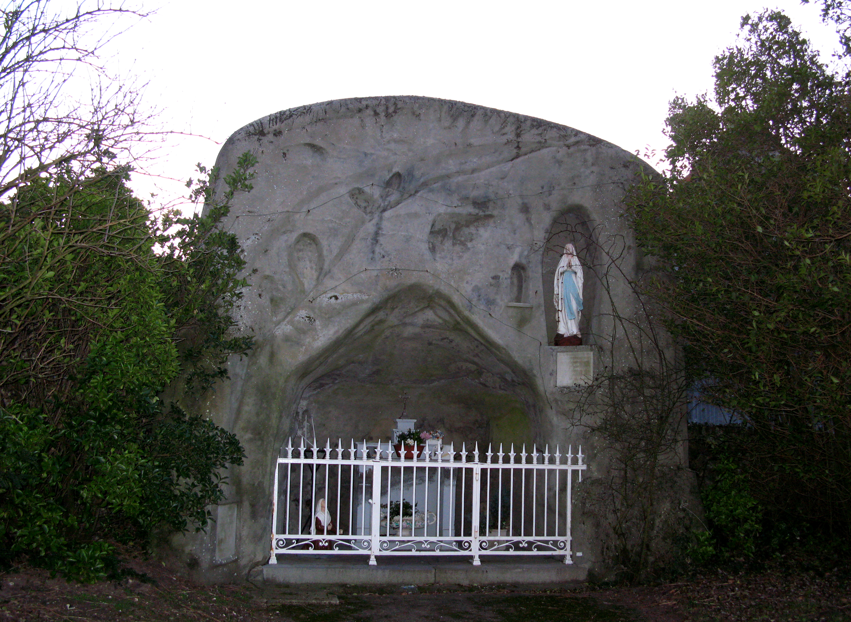 La réplique de la Grotte de Lourdes, à proximité immédiate de l'église et avant l'entrée du cimetière,Nouvion (Somme, France).